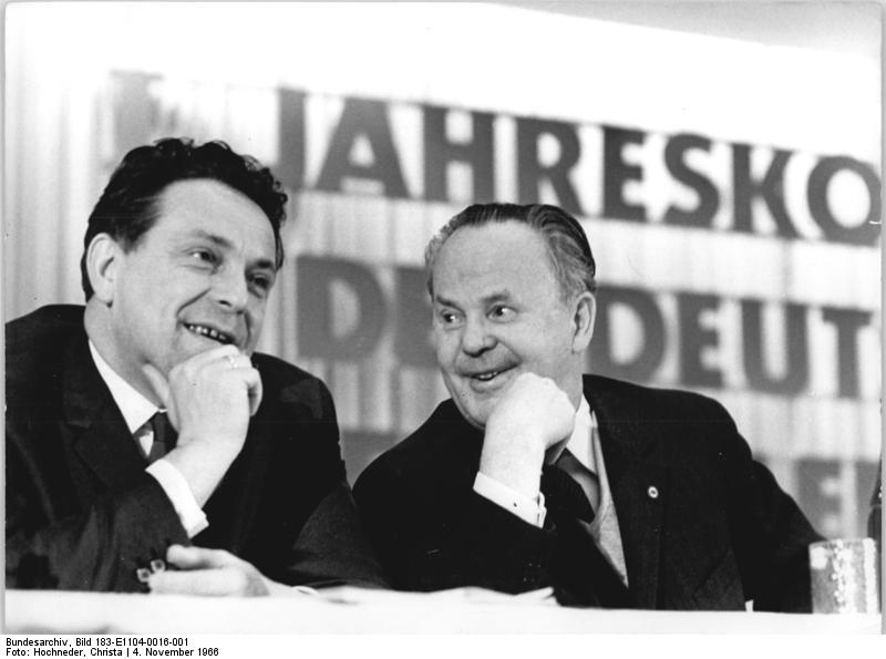 Zentralbild Hochneder 4.11.1966 Berlin: Otto Gotsche und Max Walter Schulz im Präsisium der Jahreskonferenz des Schriftstellerverbandes Otto Gotsche (rechts), Sekretär des Staatsrates und Mitglied des Vorstandes des Deutschen Schriftstellerverbandes, und Max Walter Schulz, Direktor des Literaturinstitutes "Johannes R. Becher" in Leipzig, im Präsidium der 1. Jahreskonferenz des Schriftstellerverbandes, die vom 2. bis 4.11. in der Kongreßhalle am Berliner Alexanderplatz stattfindet.